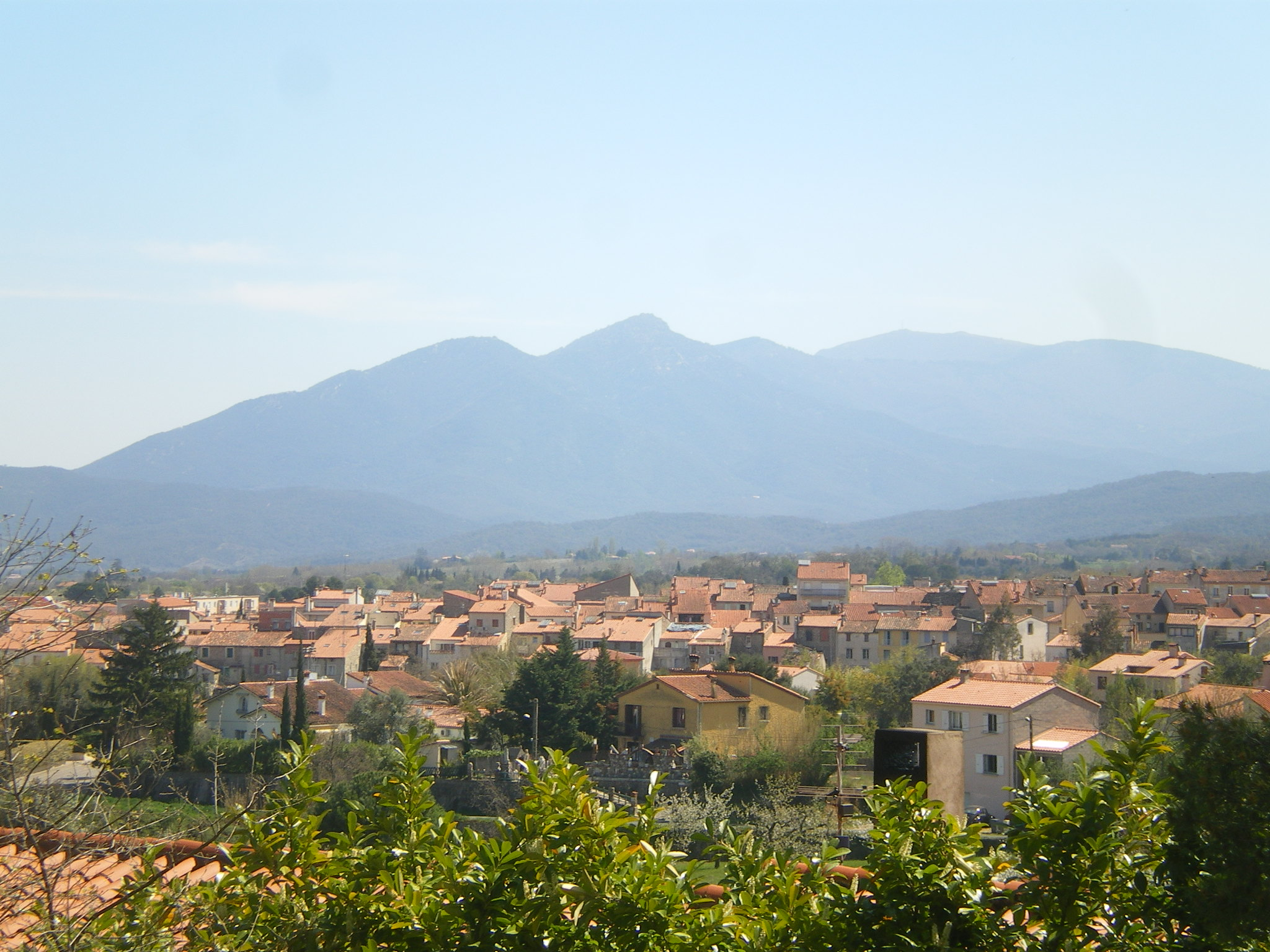 Ceret, les Albères et le pic Néoulous